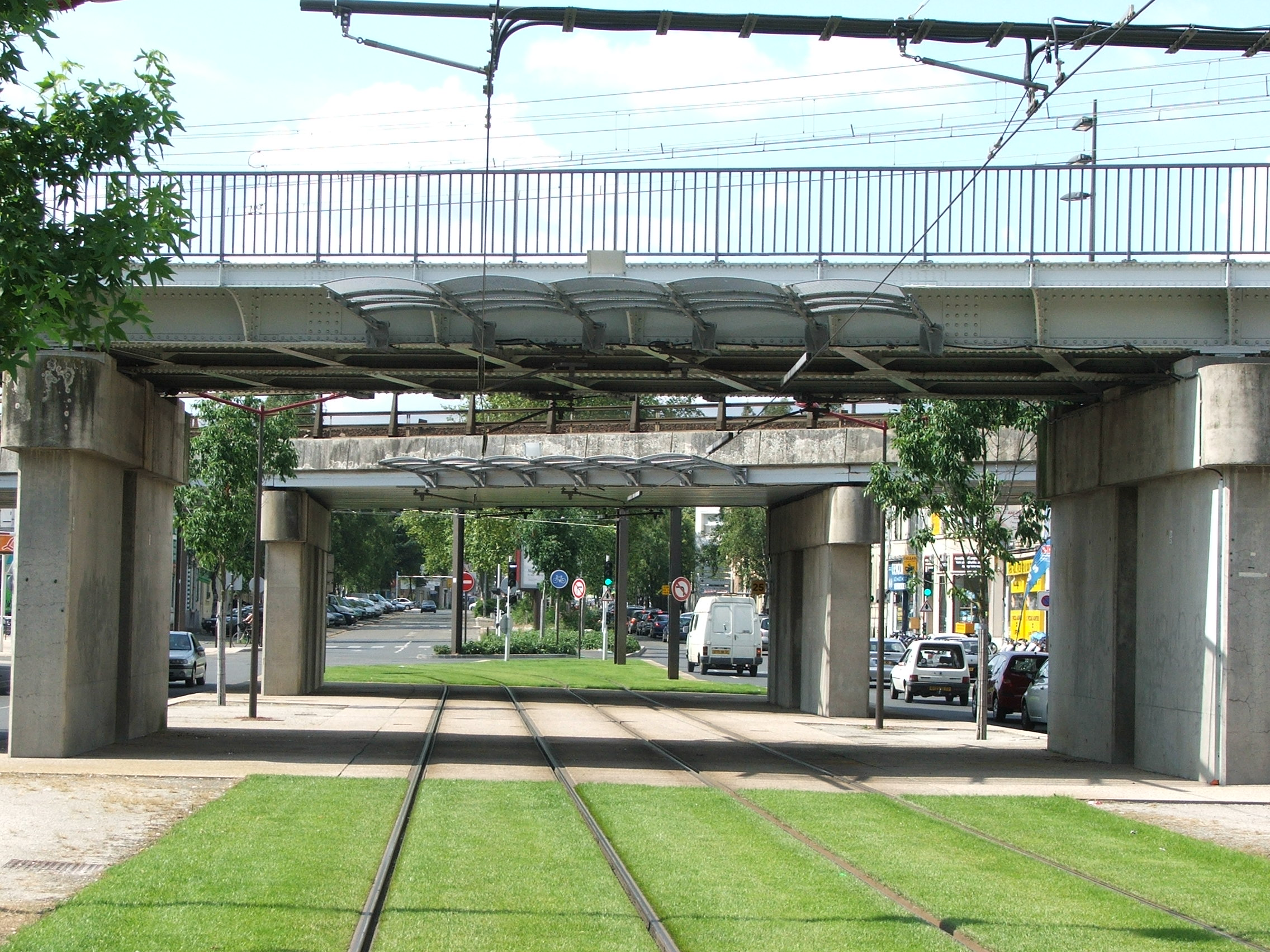 Les viaducs de l'avenue Jean-Jaurès, au croisement avec le Boulevard Emile Zola.